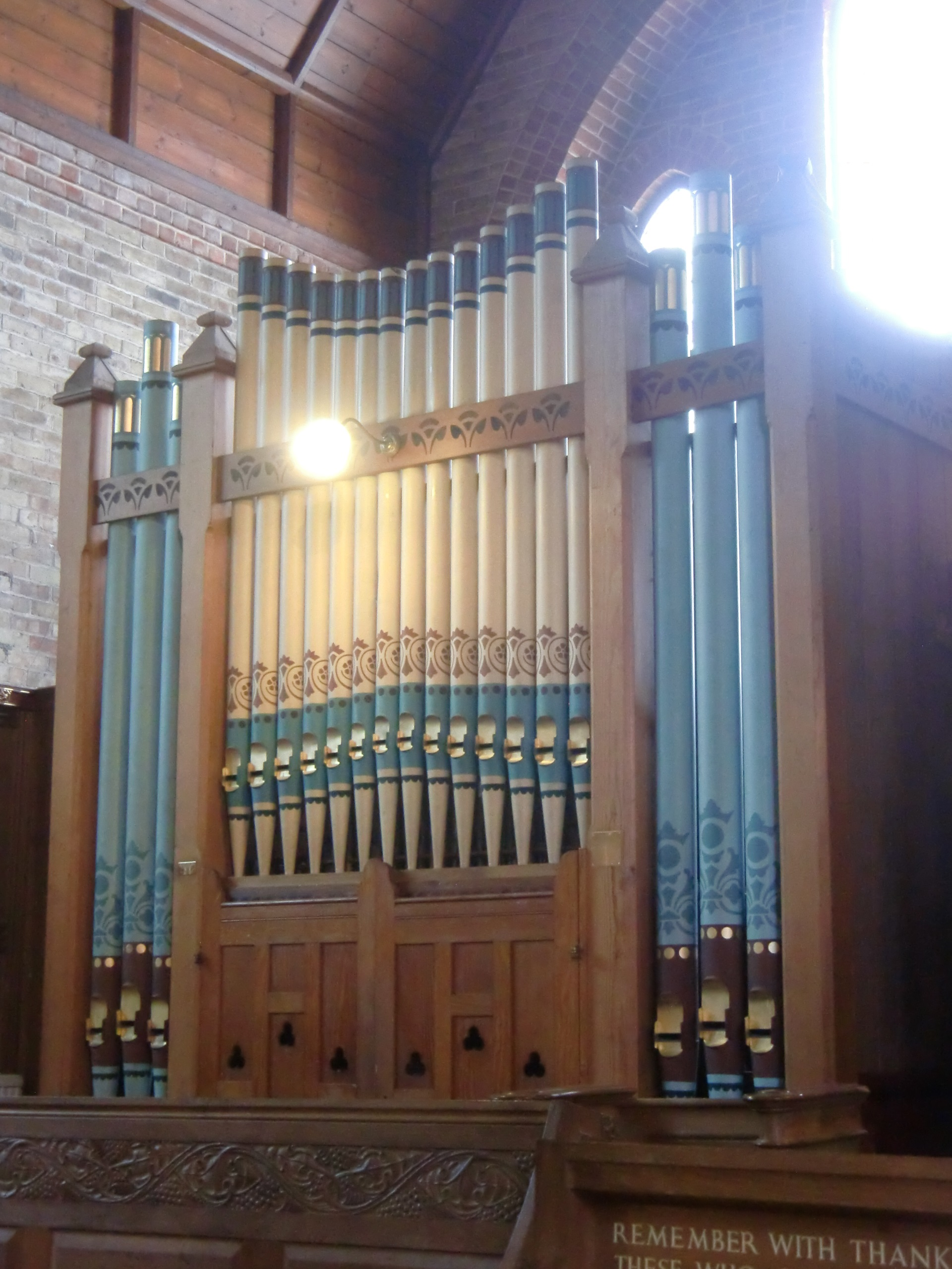 Orgue de la Cathédrale de Port Stanley (Îles Malouines)